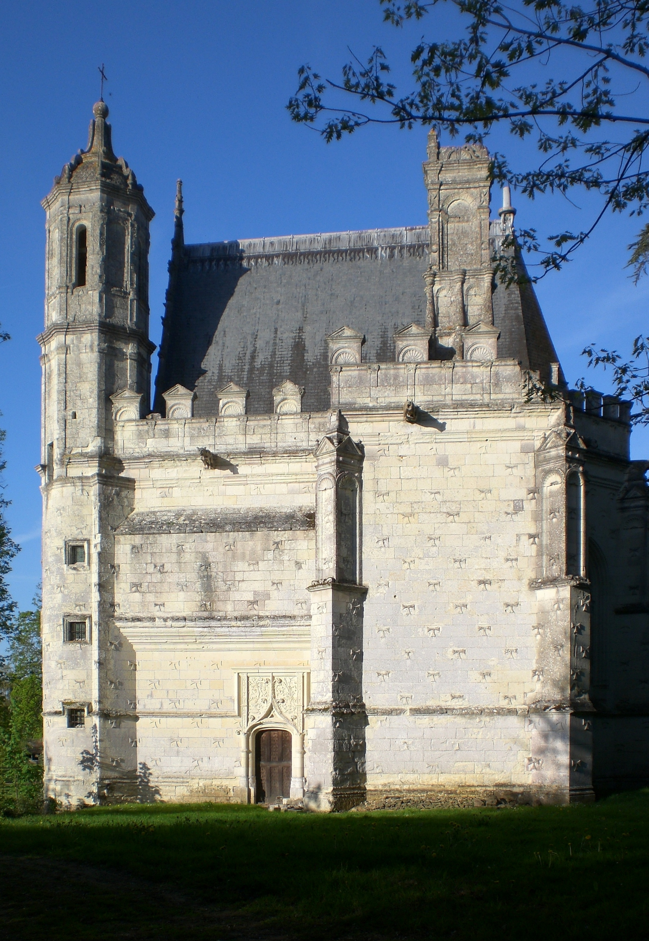 Chapelle du Christ-Habillé, château de la Bourgonnière. Fr-49-Bouzillé.